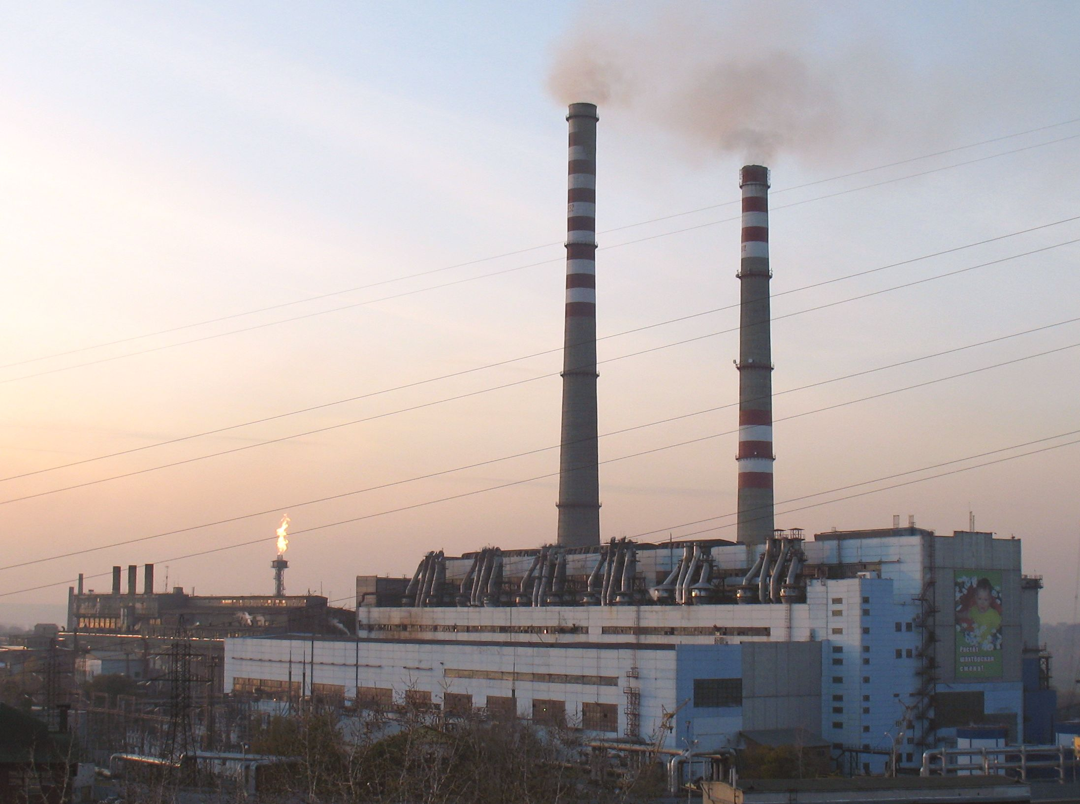 Вид на главный корпус Кемеровской ГРЭС, г. Кемерово